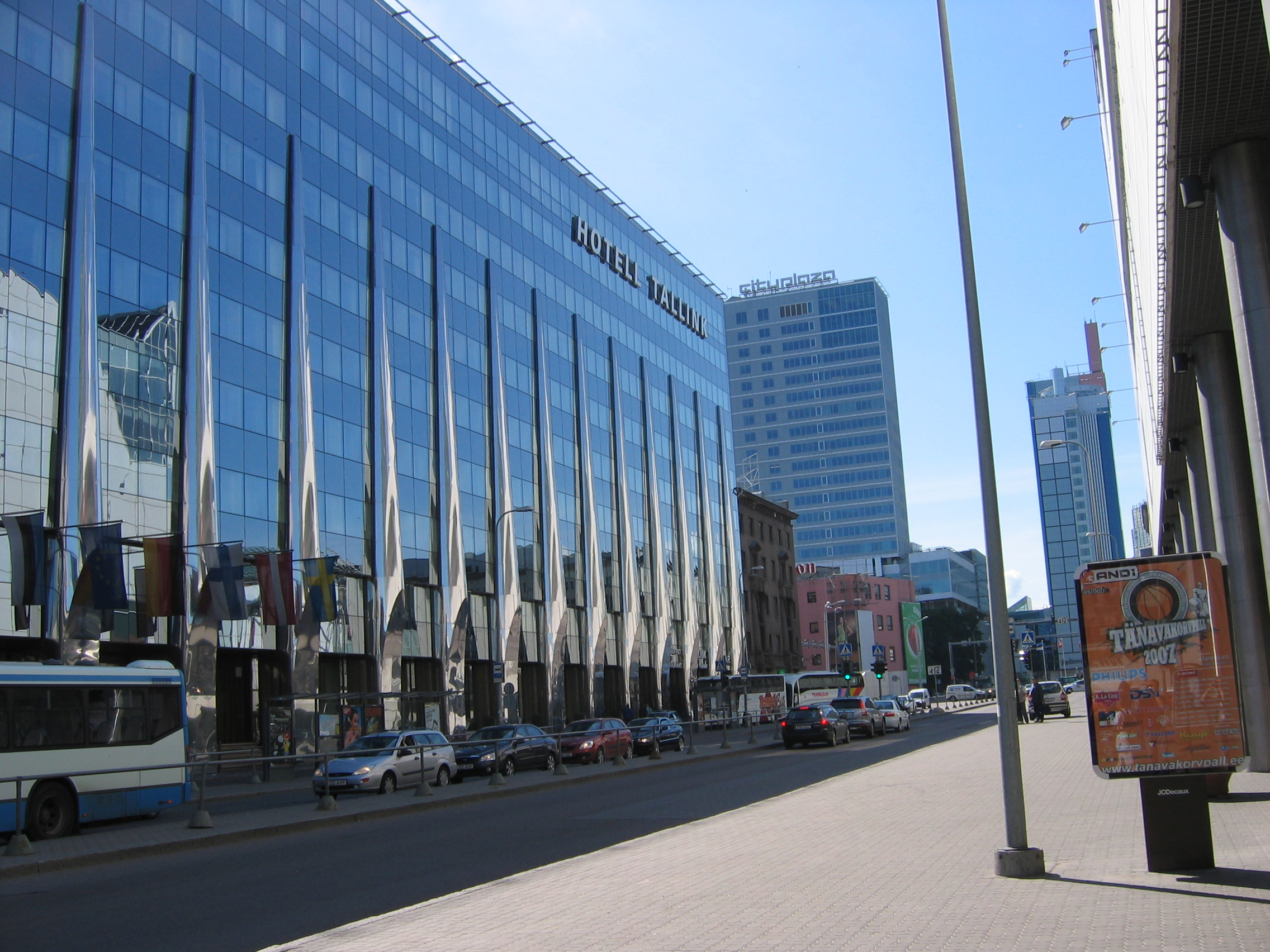 Tallinn, Stadtzentrum